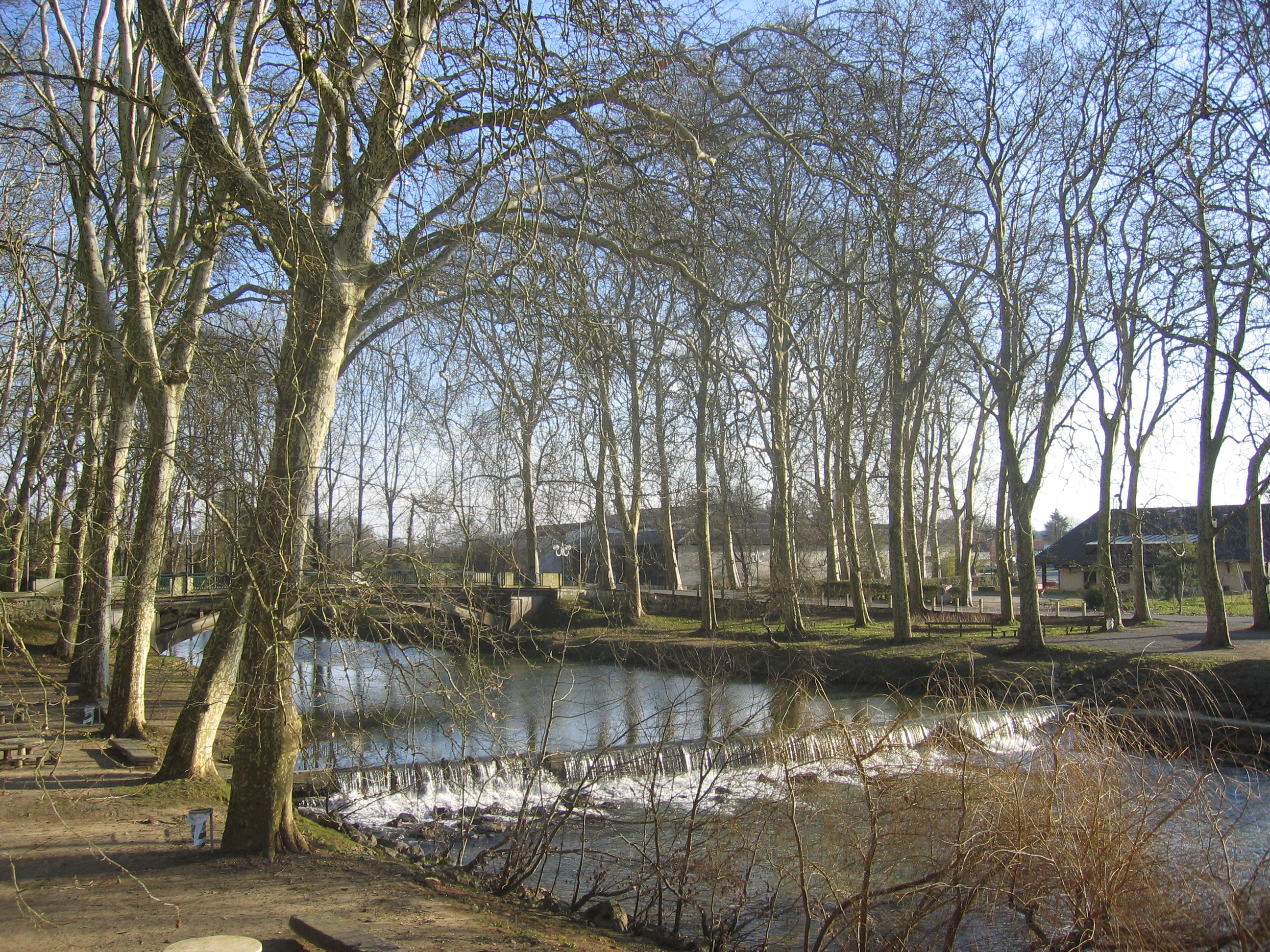 AMOU: Altitude 47 m. - 1488 habitants - Paris 800 km. - Amou se situe en Chalosse dans le sud des Landes à 31 km de Dax, ville thermale, à 14 km d'Orthez et 51 km de Mont de Marsan. Les gares SNCF les plus proches sont Dax et Orthez. Les aéroports: Pau Pyrénées et Biarritz Parme. Bordeaux se situe à 2 h. (source: office du tourisme d'Amou) La rivière photographiée ici est le Luy de Béarn.